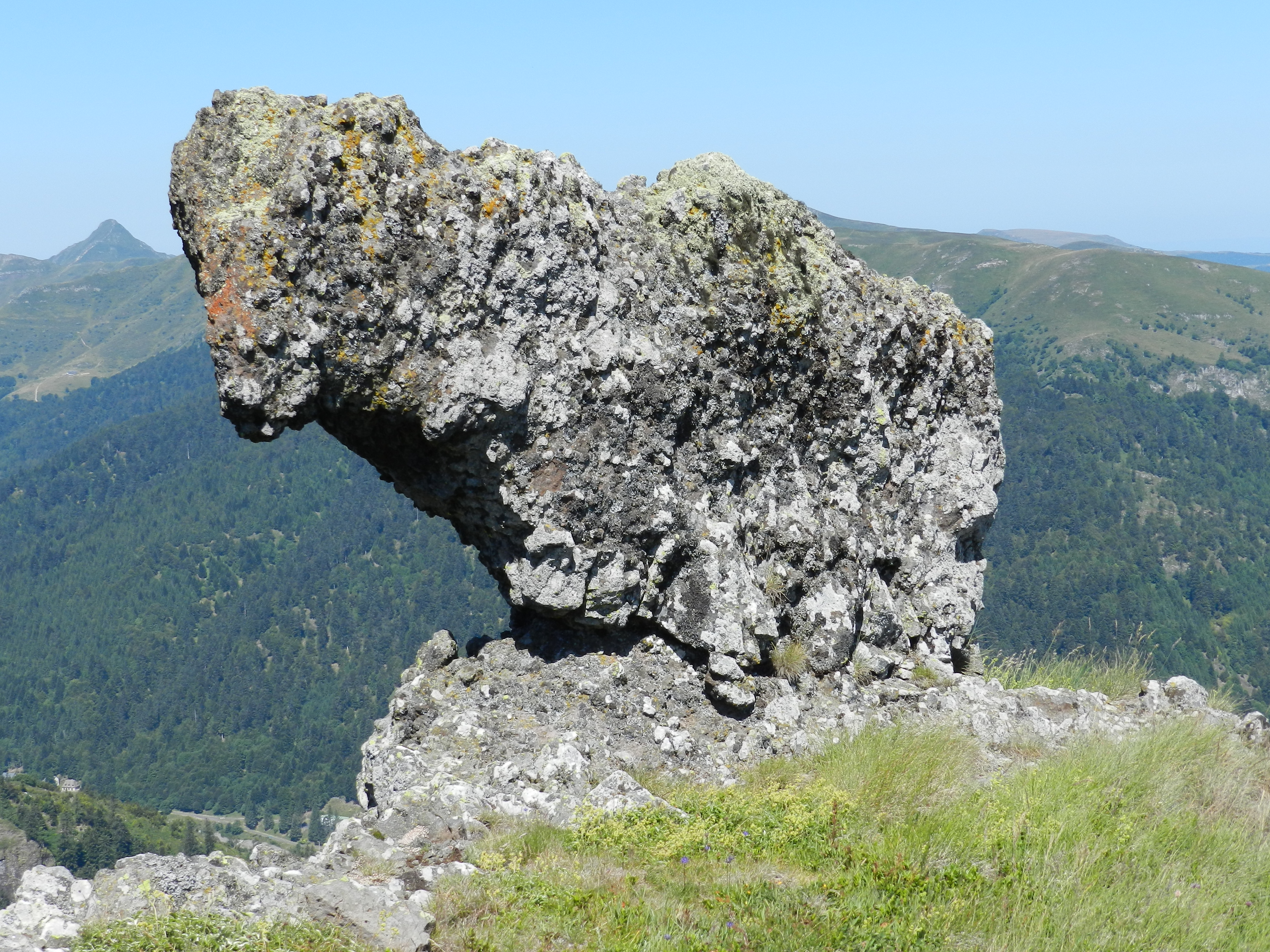 Le rocher surplombe le vallon de Gouyère